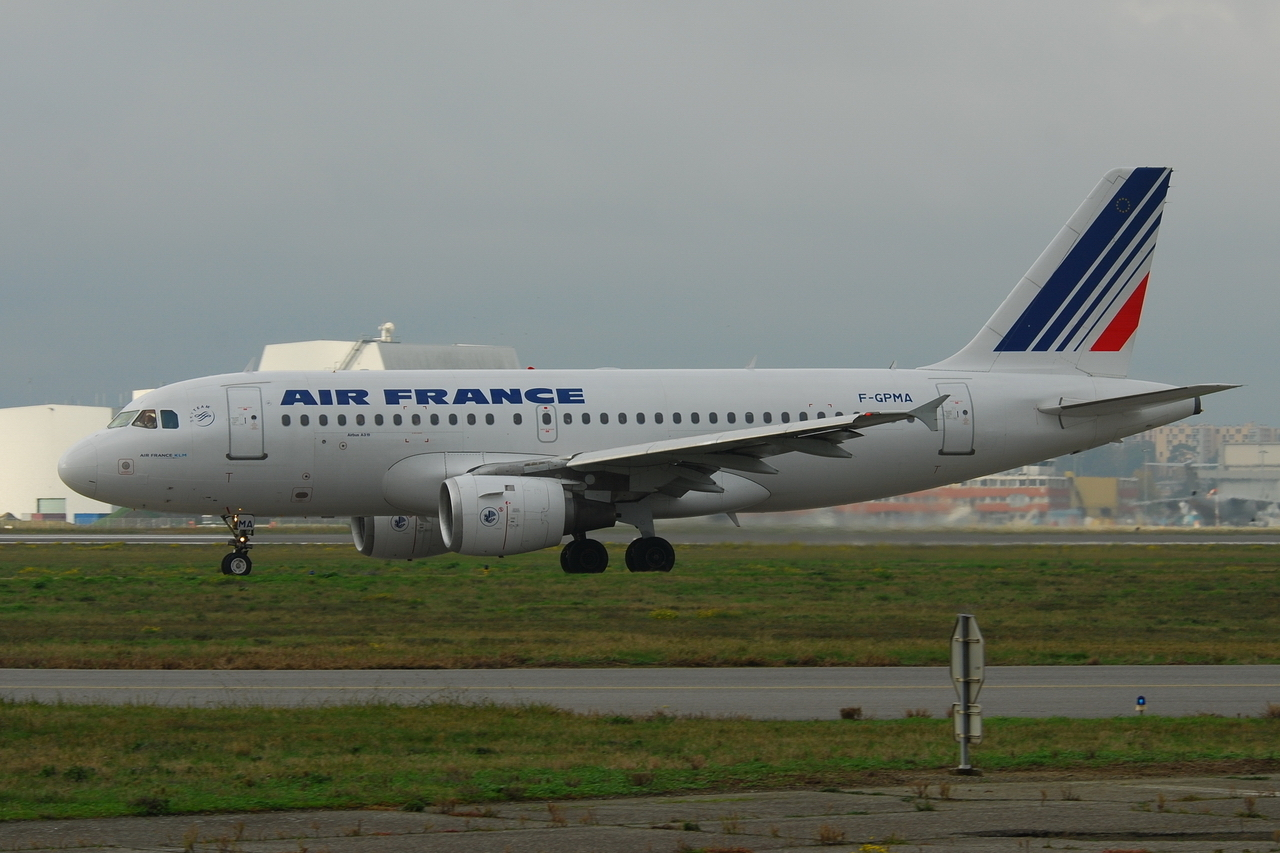 Photo prise à l'aéroport de Toulouse-Blagnac (LFBO) en France. Picture take at Toulouse-Blagnac Airport (LFBO) in France.